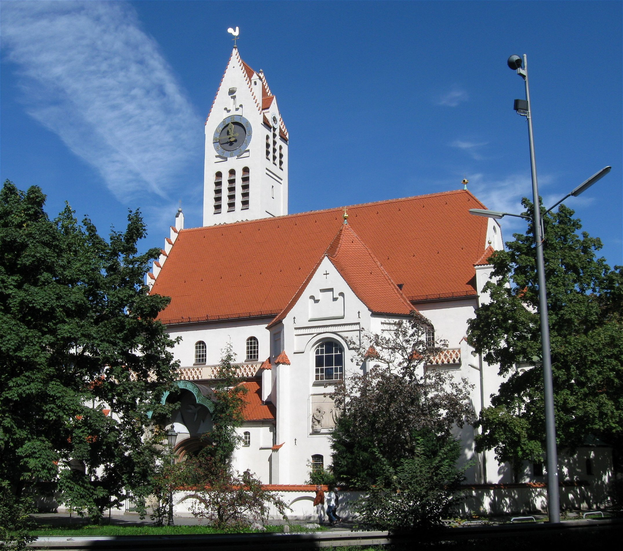 Ungererstraße 13; Evang.-Luth. Erlöserkirche, malerischer, historisierender Bau mit Turm, 1901-02 von Theodor Fischer; mit Ausstattung; mit zugehöriger Vorgartenmauer